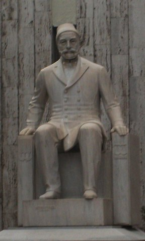 Ankara bulunan Mithat Paşa Anıtı